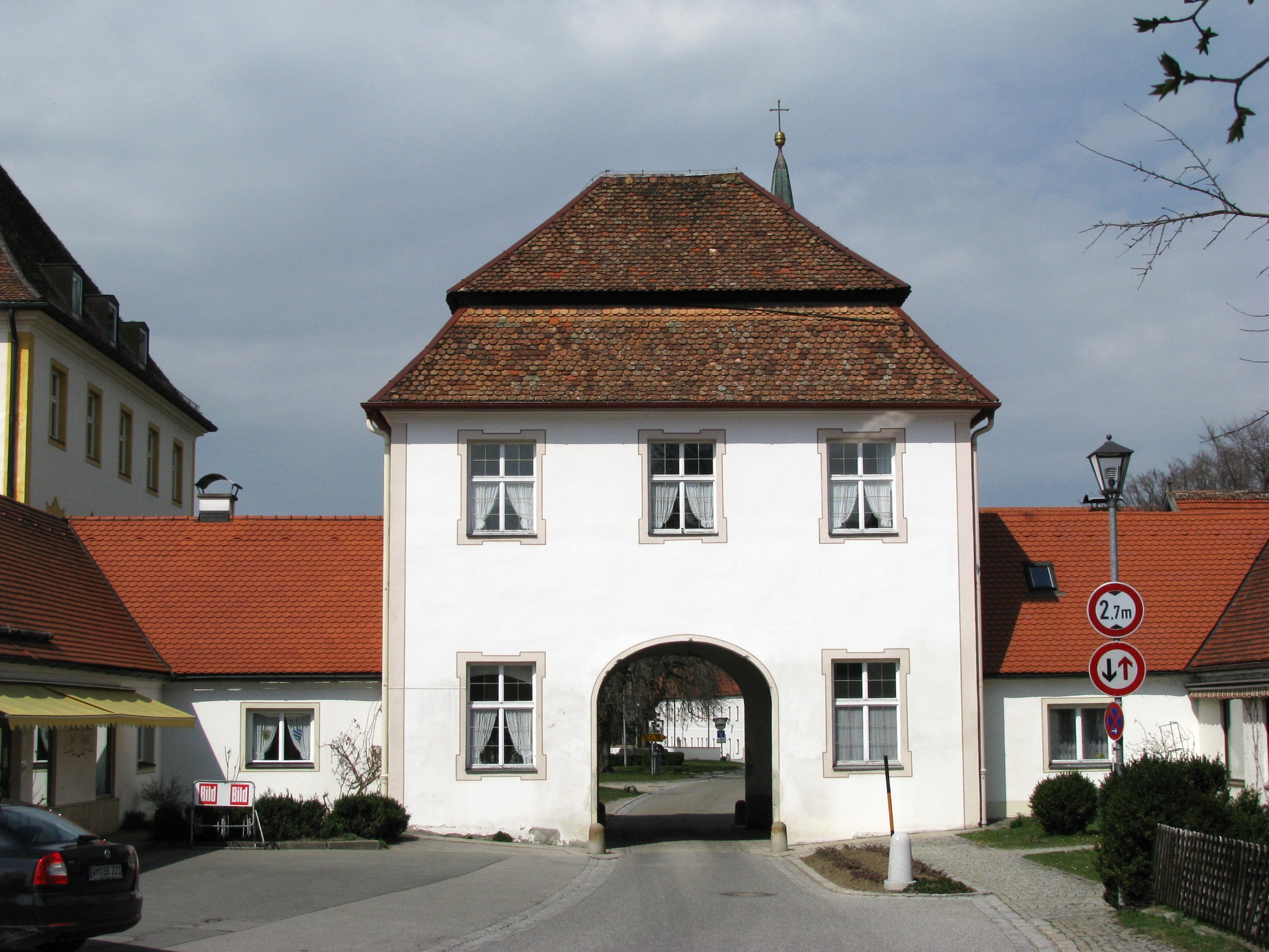 Torhaus; mit Mansardwalmdach und Durchfahrt, zwei erdgeschossige Flügelbauten, 1758 ff.